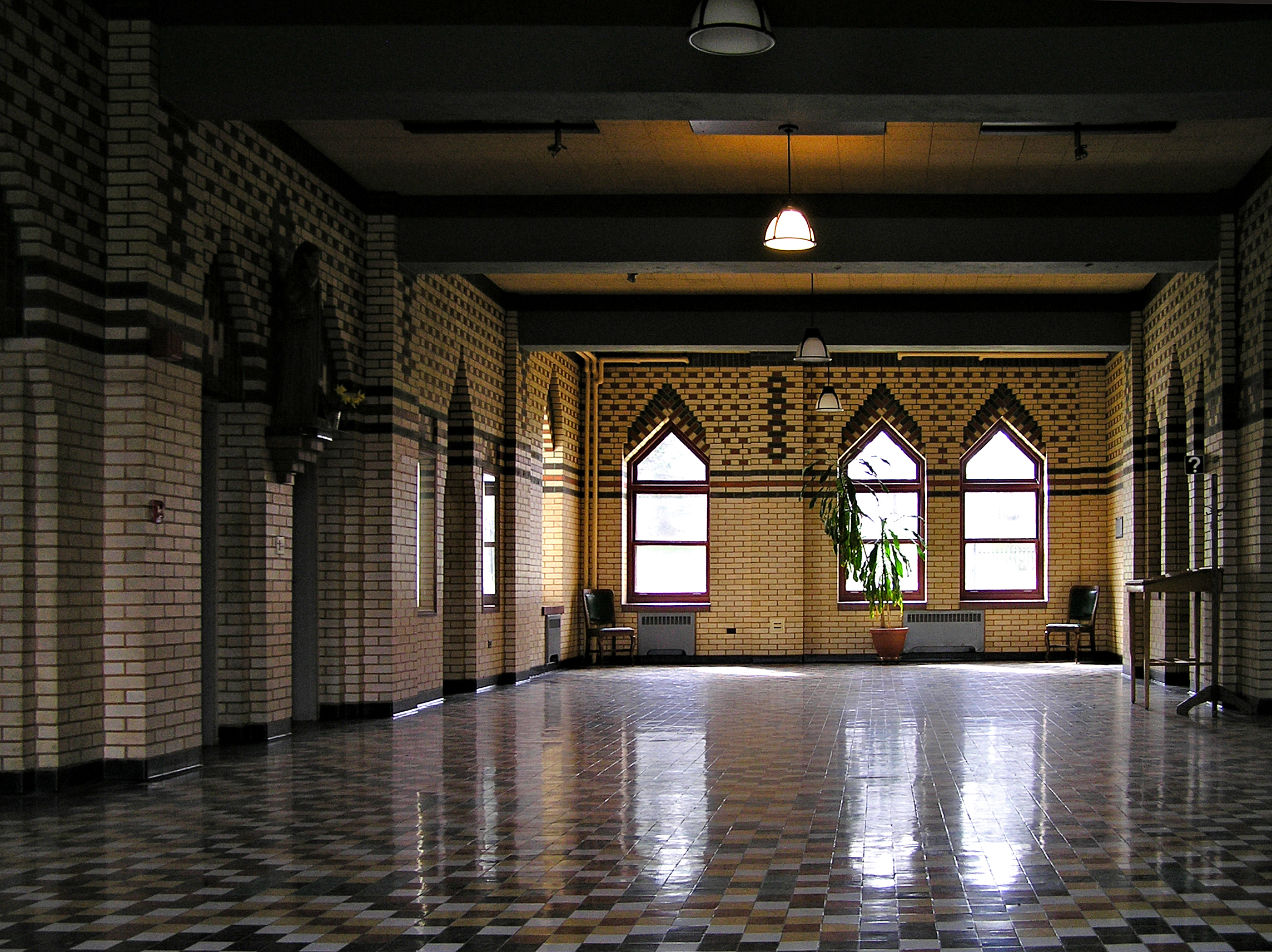 Abbaye de Saint-Benoît-du-Lac - Hall d'entrée